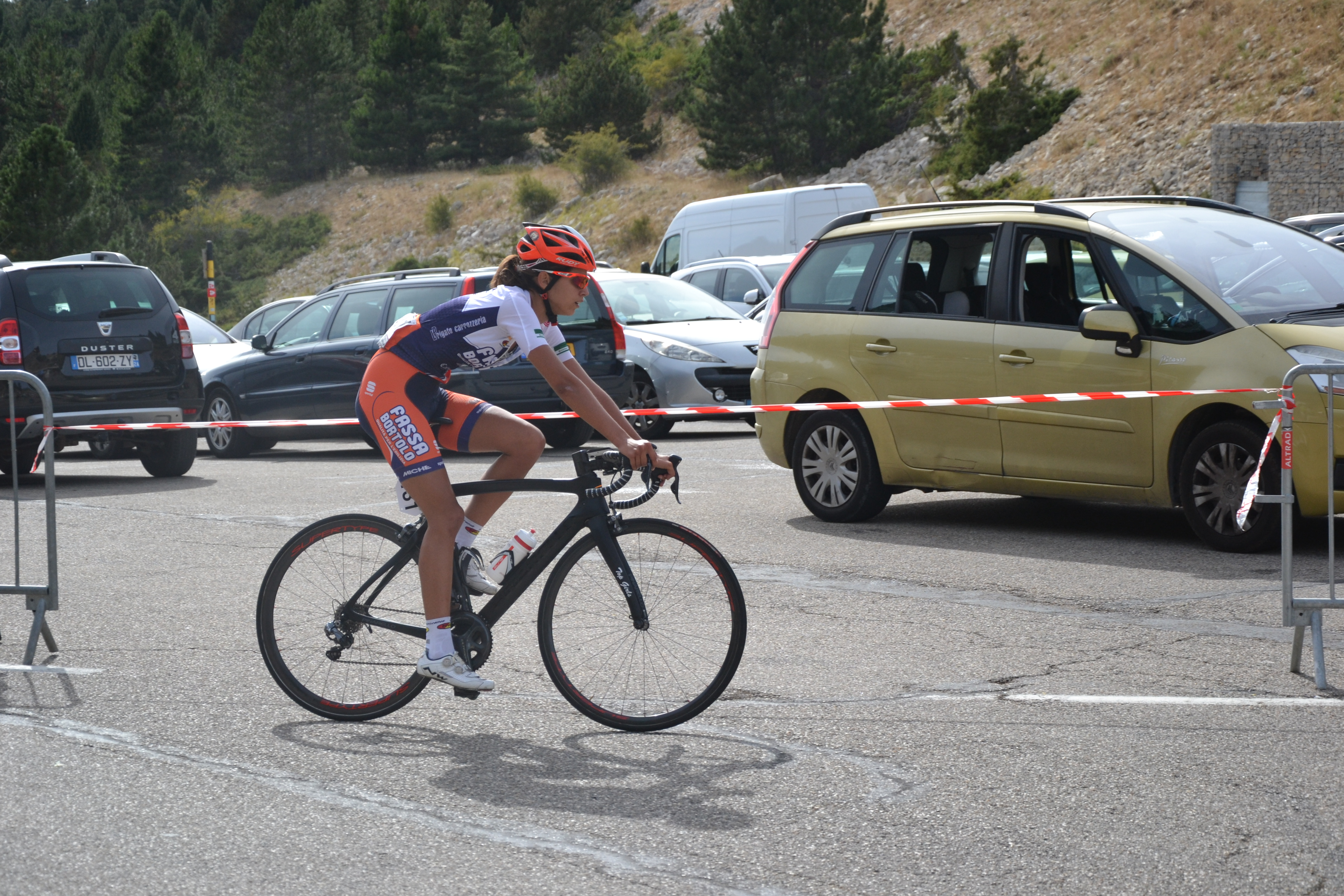 Tour féminin international de l'Ardèche 2016, 3ème étape, lors de l'ascension du Mont Ventoux.